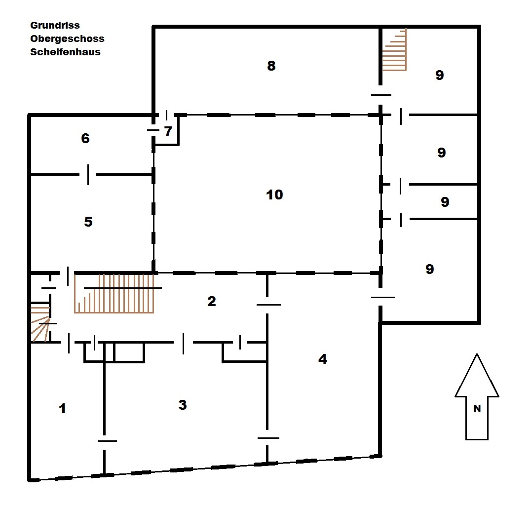 Grundriss Obergeschoss, Schelfenhaus Volkach. Legende: 1. "Professor-Rösser-Zimmer", 2. Korridor, 3. "Ofensaal", 4. "Bildersaal", 5. und 6. Nebenräume, 7. Anbau, 8. "Weißer Saal", 9. Räume im Scheunenbau, 10. Innenhof